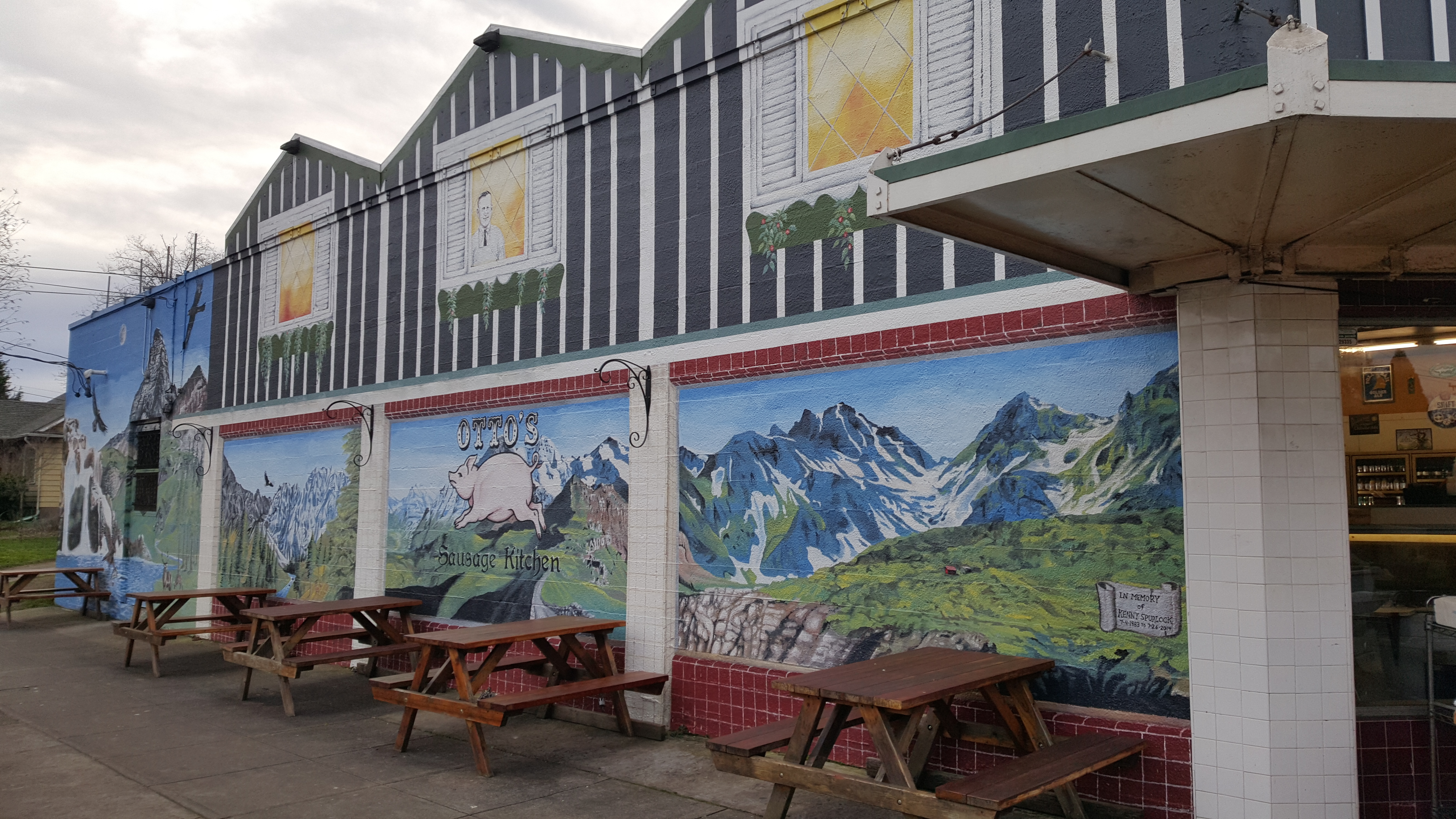 Otto's Sausage Kitchen, Portland, Oregon, 2016